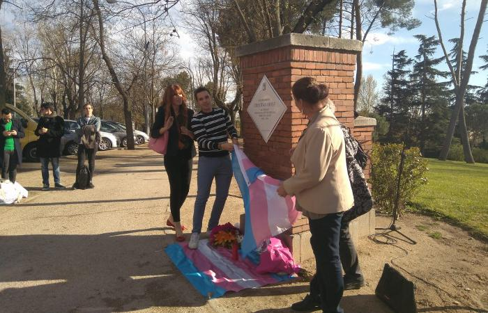 “En memoria de Cristina Ortiz ‘La Veneno’, valiente mujer transexual visible en los 90”. Es lo que se puede leer en la placa que se ha colocado esta semana para recordarla en uno de los espacios donde se sintió más libre, el Parque del Oeste.